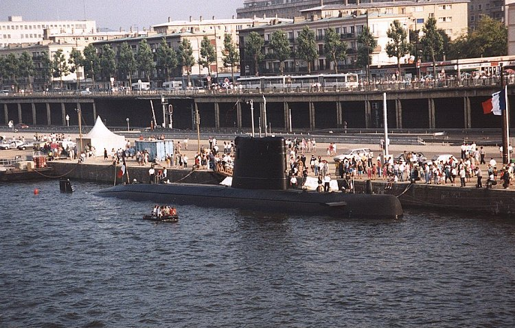 Sous-marin français Agosta en escale à Rouen en juillet 1994 à l'occasion de la manifestation "Armada de la liberté" Original caption: " Photo © Guillaume Rueda"